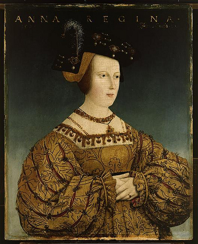 Schwester König Ludwigs II von Ungarn und Frau Ferdinands I. von Österreich